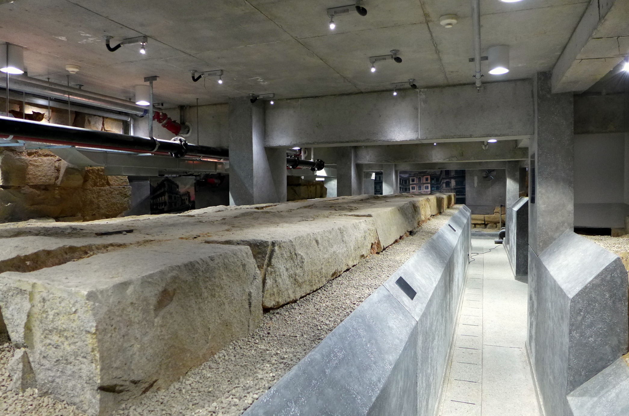 Glimpse PMQ